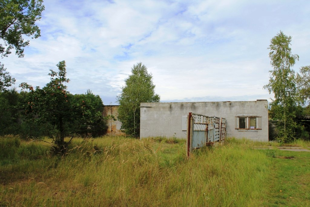 Eingang zum Siemenslager